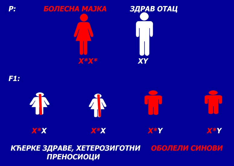 аутор: Снежана Трифуновић